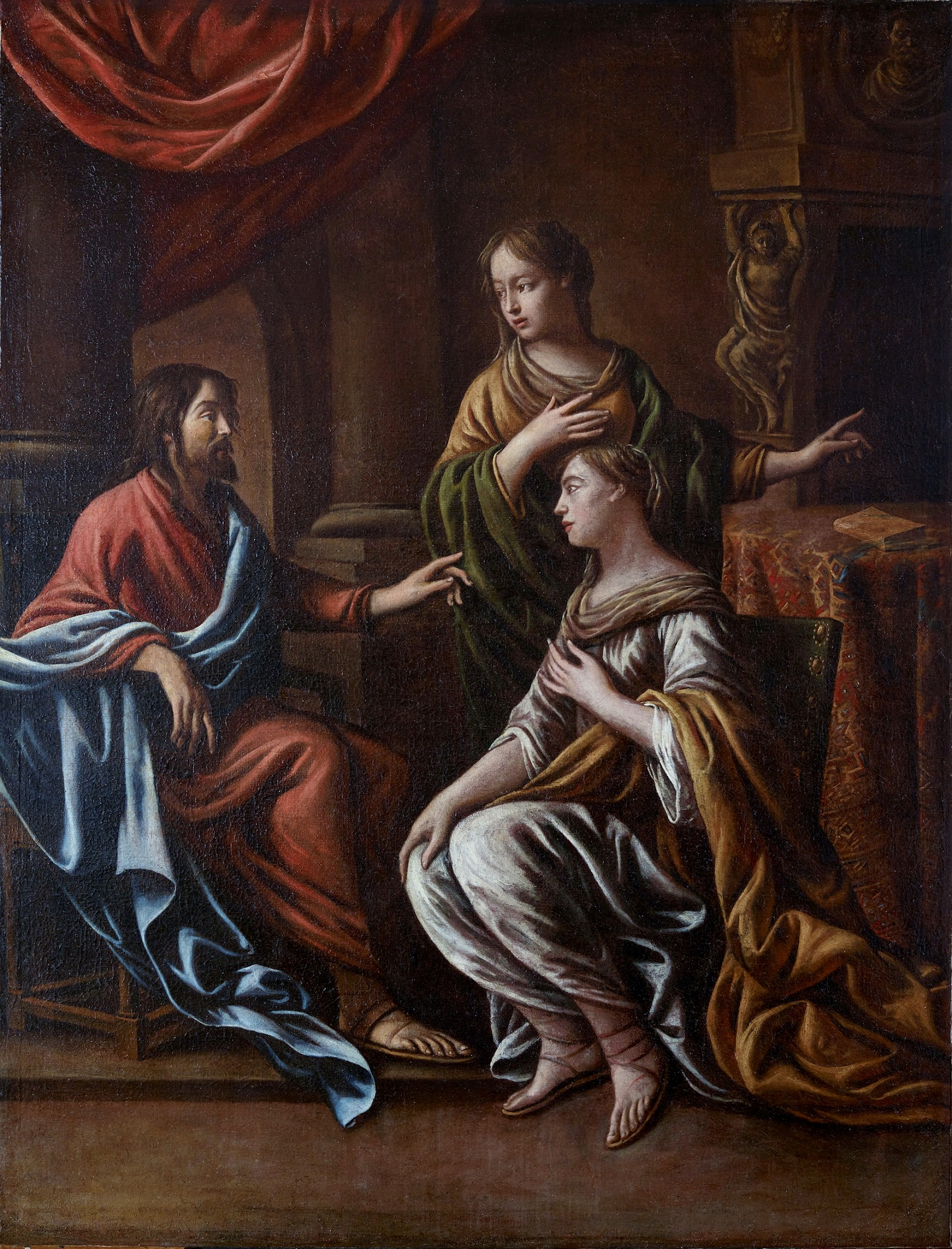 Mathieu Le Nain : Le Christ chez Marthe et Marie (huile sur toile, musée des beaux-arts de Rennes). Ce tableau a été découvert en 2012 dans l'église paroissiale de Saint-Didier (Ille-et-Vilaine) où il était jusque-là considéré comme peint par un auteur inconnu)